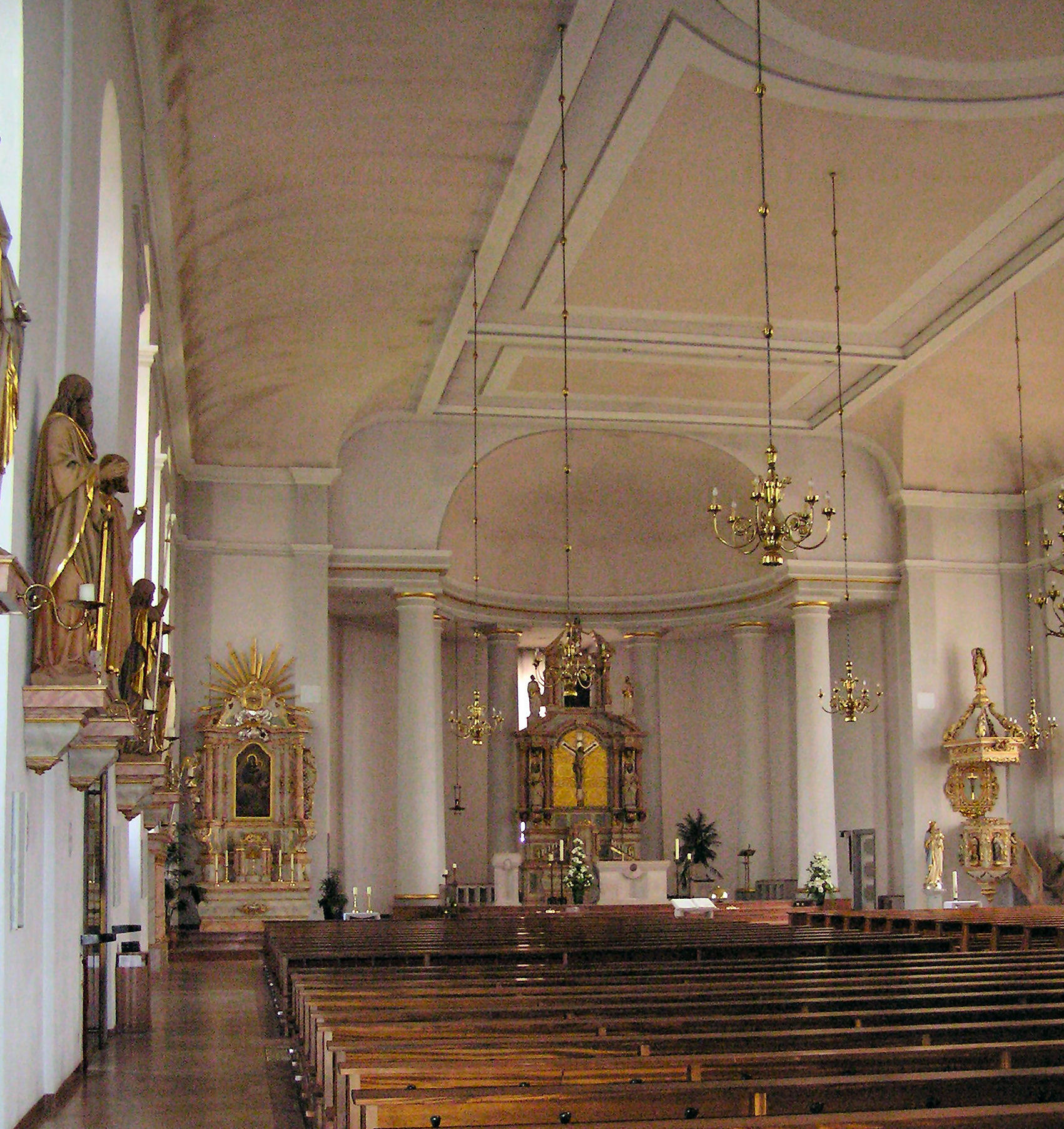 Pfarrkirche St. Vitus in Löningen